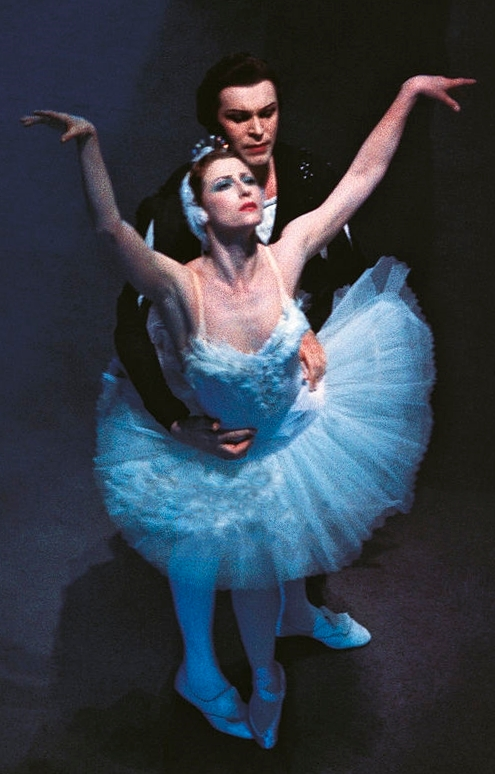 Russian dancers Maya Plisetskaya and Nikolai Fadeyechev performing 'Swan Lake'. Milan, April 1964